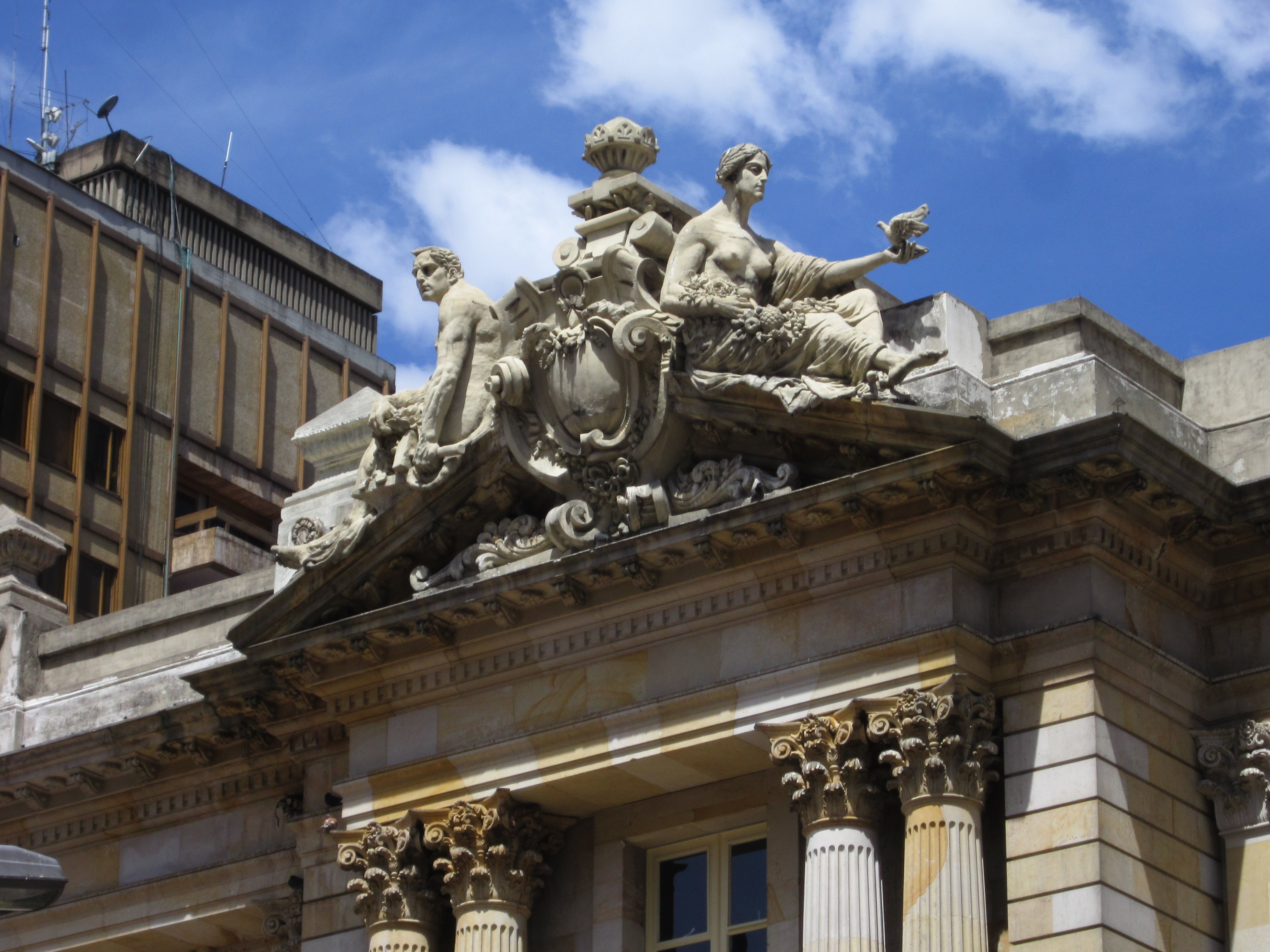 Esculturas en el palacio de San Francisco en Bogotá.